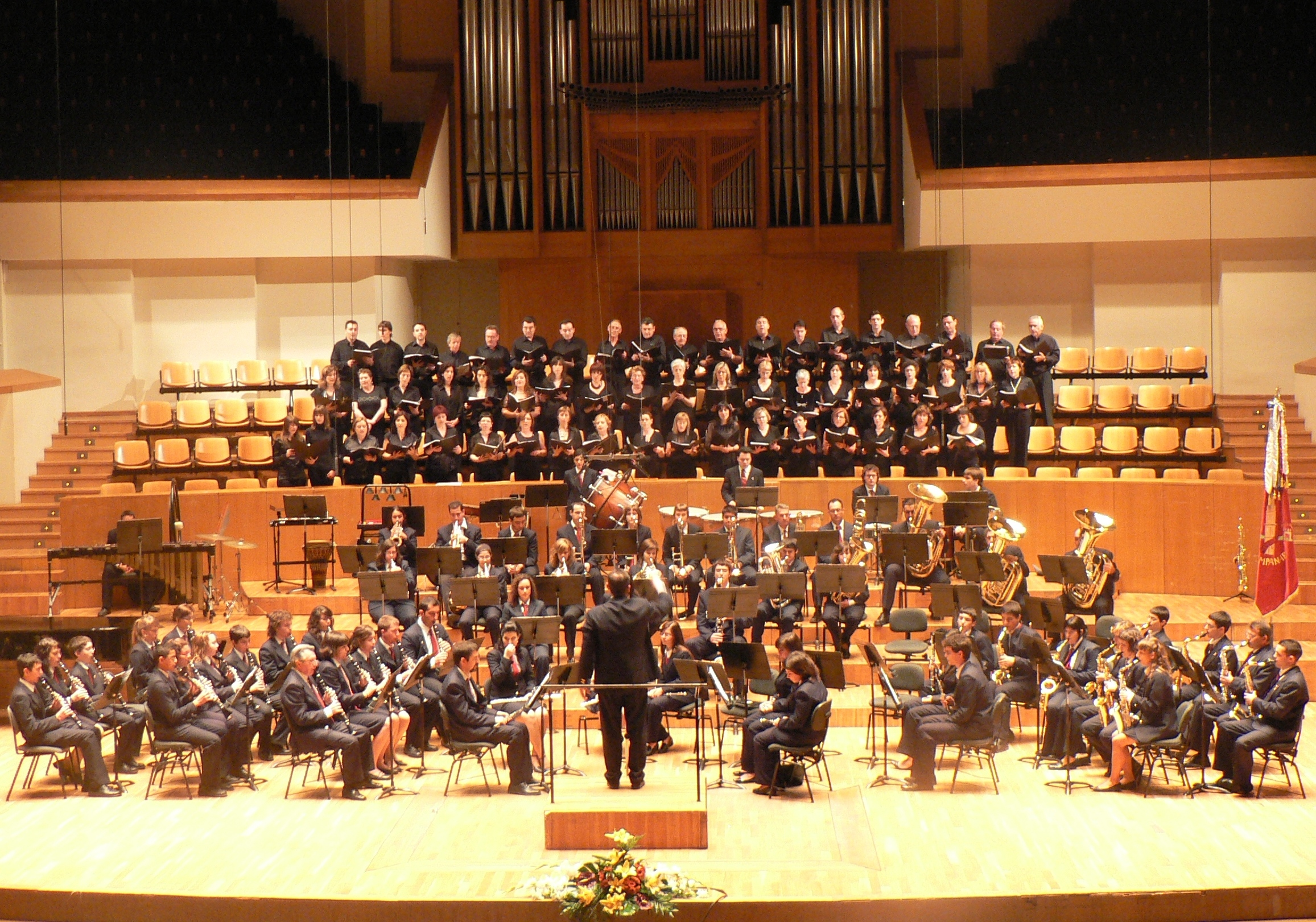 Una foto del 10 aniversario de la Banda de Musica Campanar